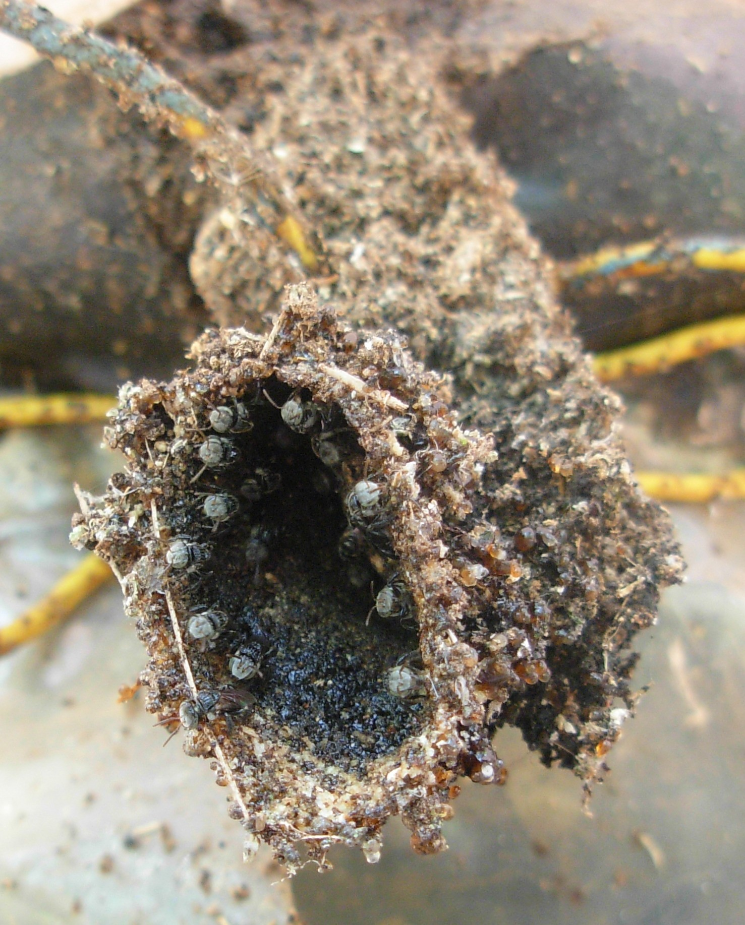 Trigona iridipennis